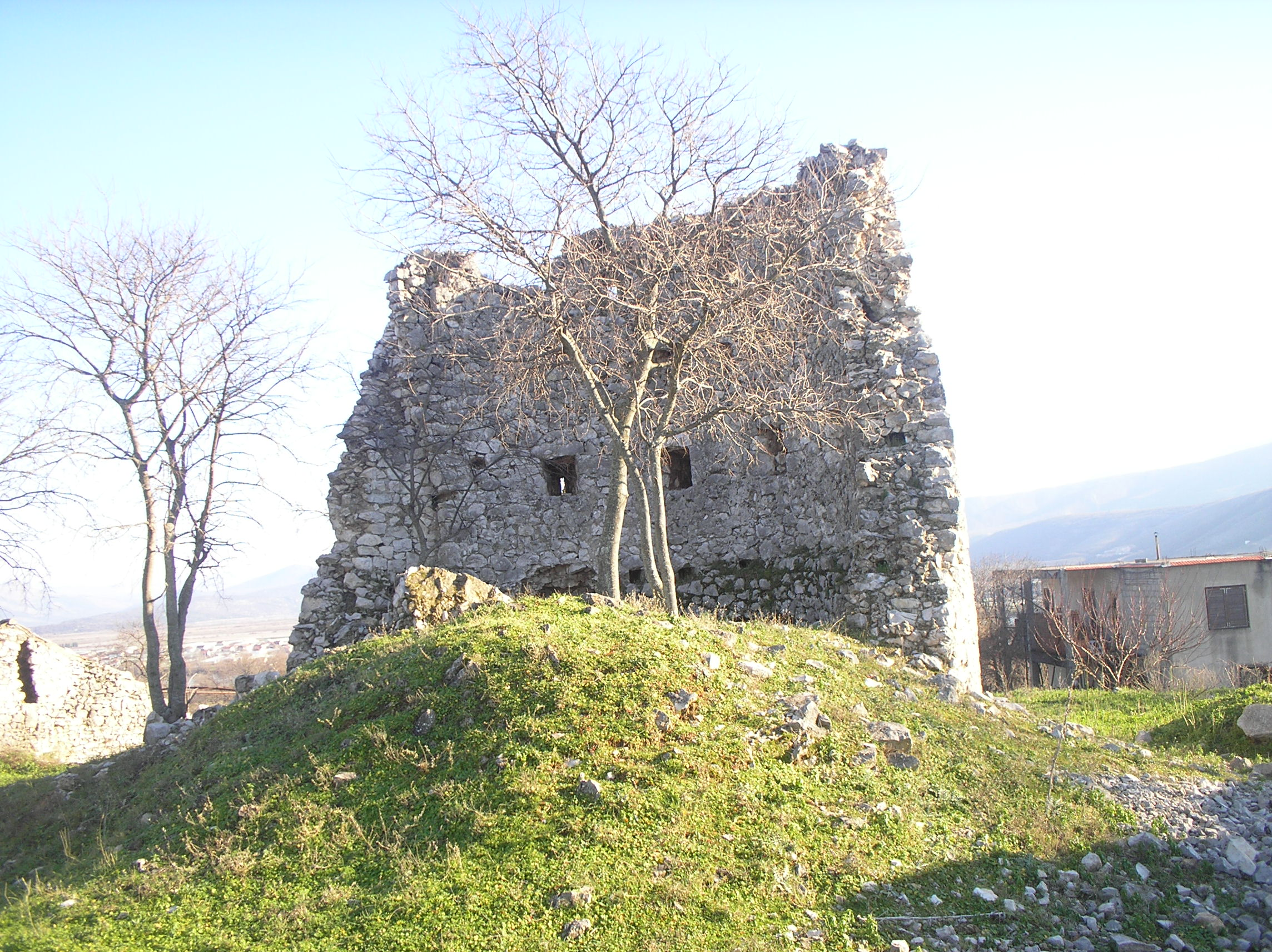 kula "Đerđelez"